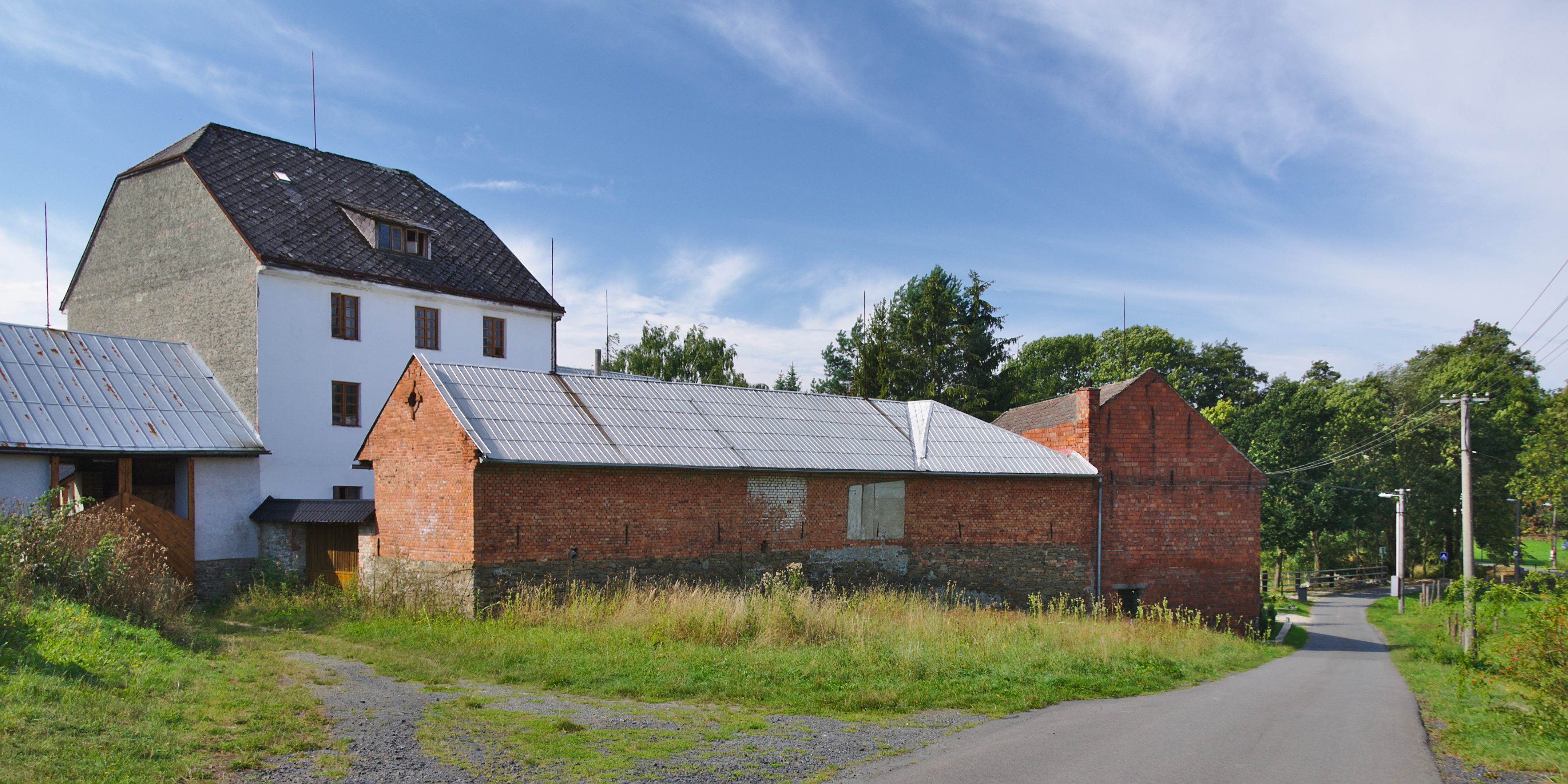 Pohled do obce, Svrčov, Lazníky, okres Přerov